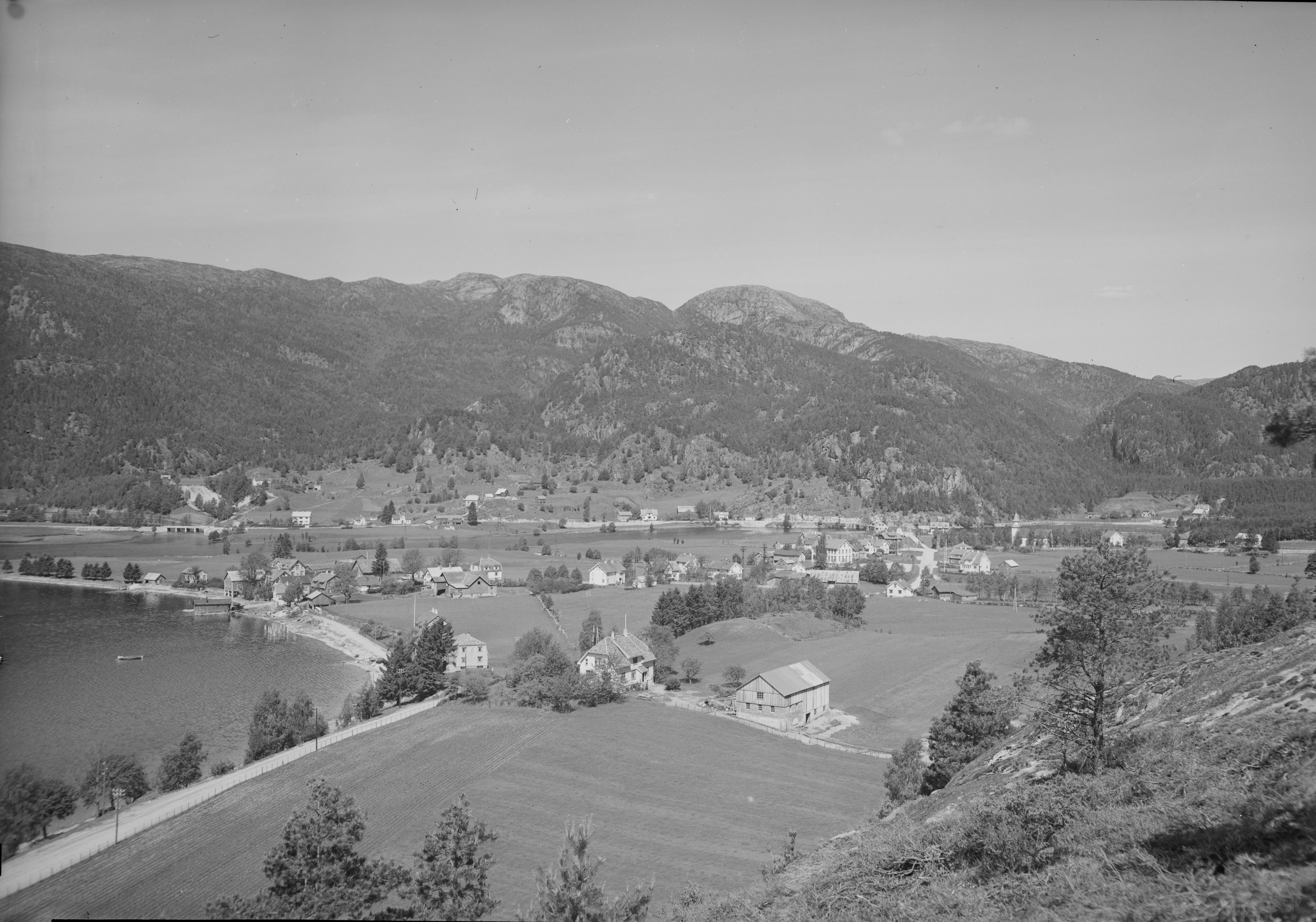 Bildet er hentet fra Nasjonalbibliotekets bildesamling. Anmerkninger til bildet var: Fotograf:Ukjent Tonstad, Sirdal, Vest Agder